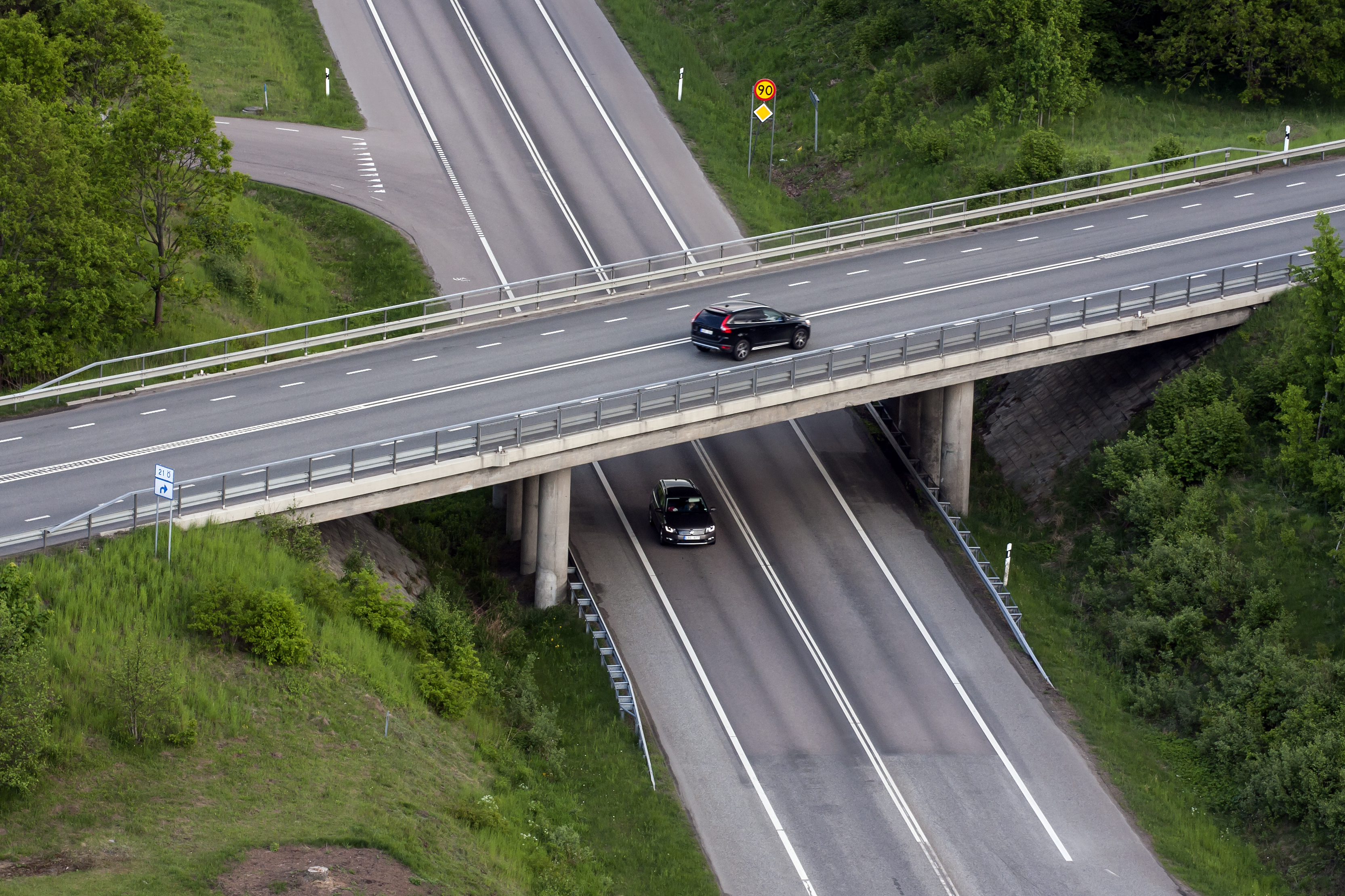 Plattbro vid korsningen av Kristianstadsvägen och väg 23 strax sydost om Hässleholm.